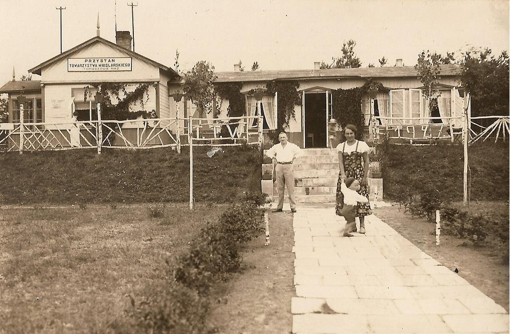 Tomaszowskie Towarzystwo Wioślarskie - przystań klubowa przełom lat 20tych i 30tych XX wieku